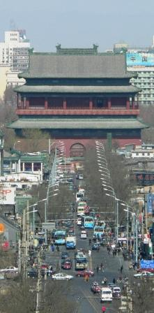 北京北中轴线，鼓楼 用心阁于2005年3月29日拍摄于zh:景山公园万春亭